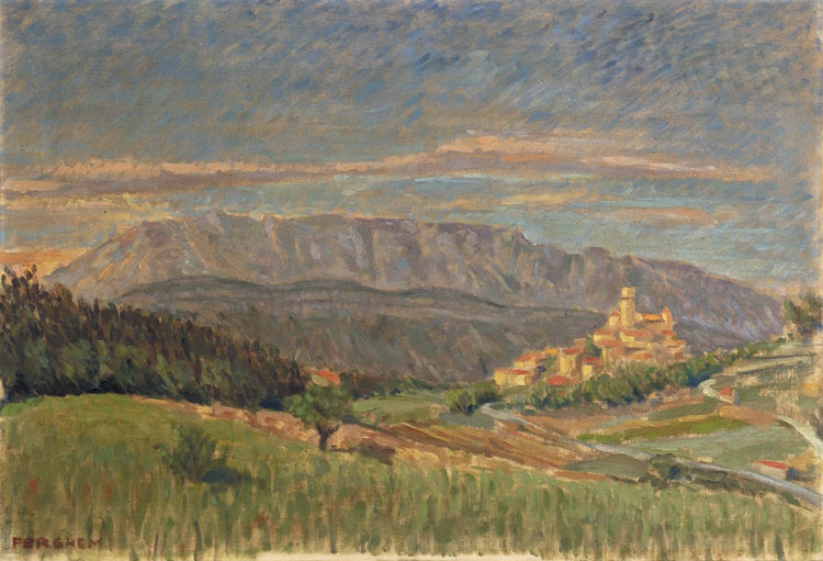 Michelangelo Perghem Gelmi, 1943, Olio su tela, cm 55x80